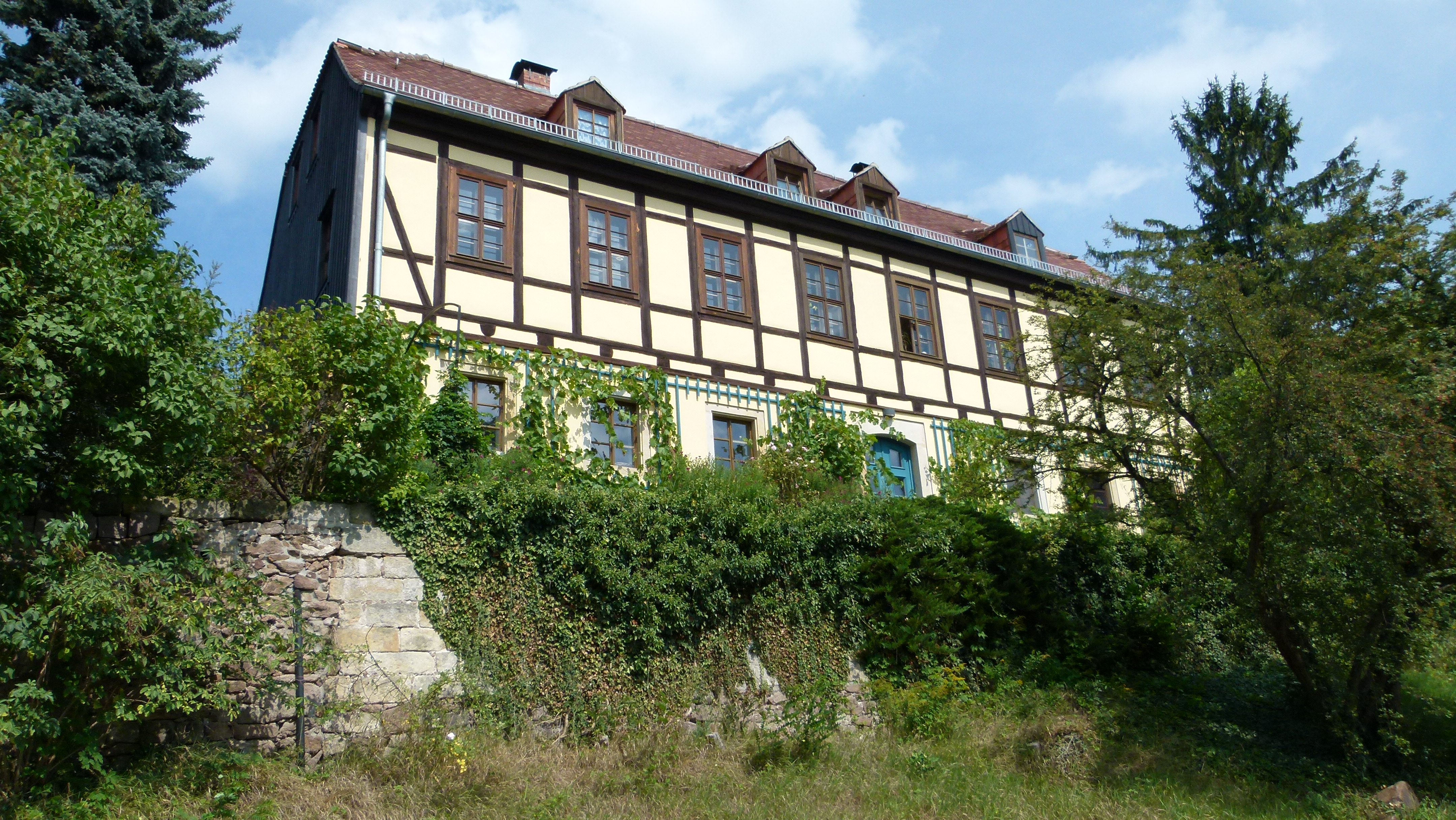 Denkmalgeschütztes Haus, Obere Bergstraße 44, Radebeul, Sachsen